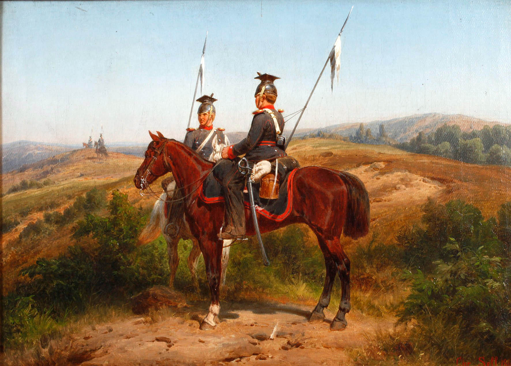 Christian Sell der Ältere - Zwei Preußische Ulanen, Öl auf Leinwand, 32,5 x 45,5 cm, signiert und datiert ”Chr. Sell 1867”